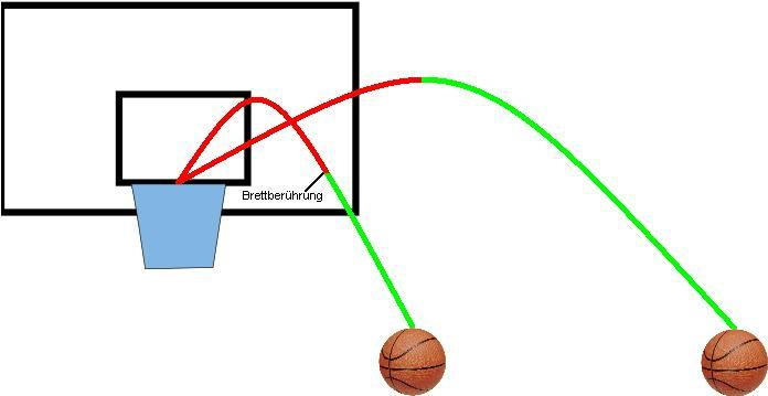 Schematische Darstellung der Basketball-Regelverletzung Goaltending